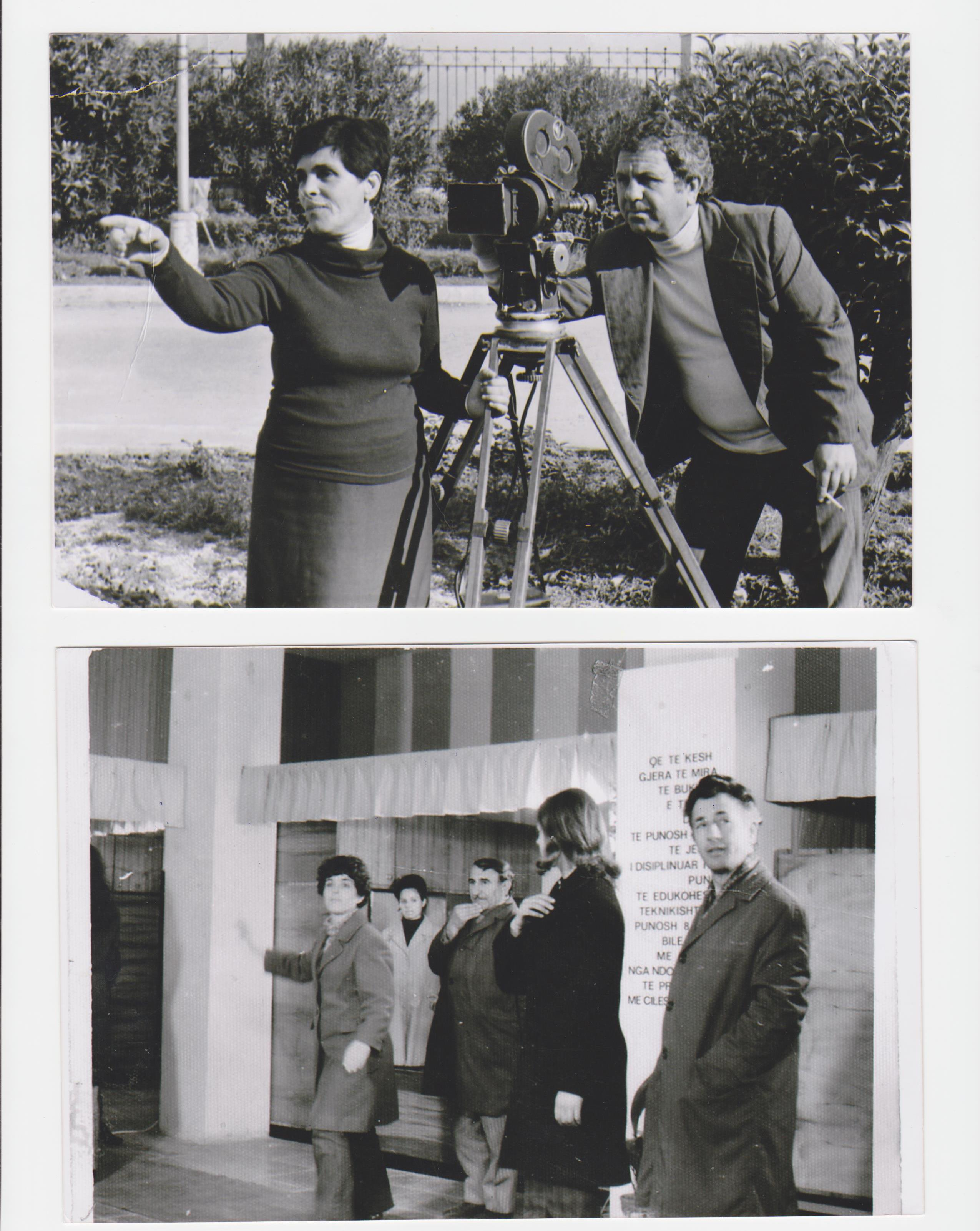 momente pune ne Kinostudio